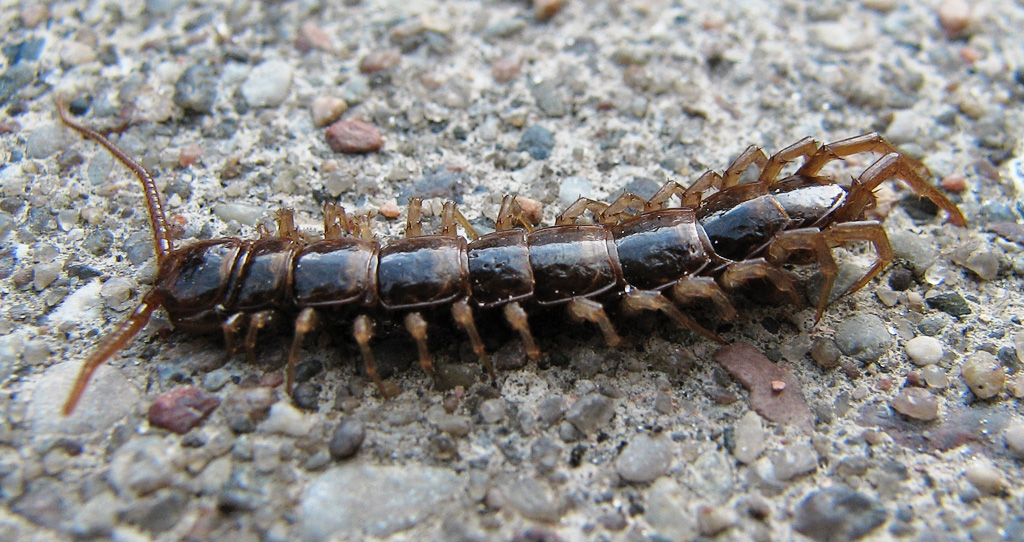 Beschreibung: Steinläufer (Lithobius forficatus) Fotograf: Darkone, 9. August 2005